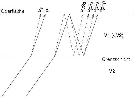 Schematische Darstellung der Receiver Function Methode in der Seismologie